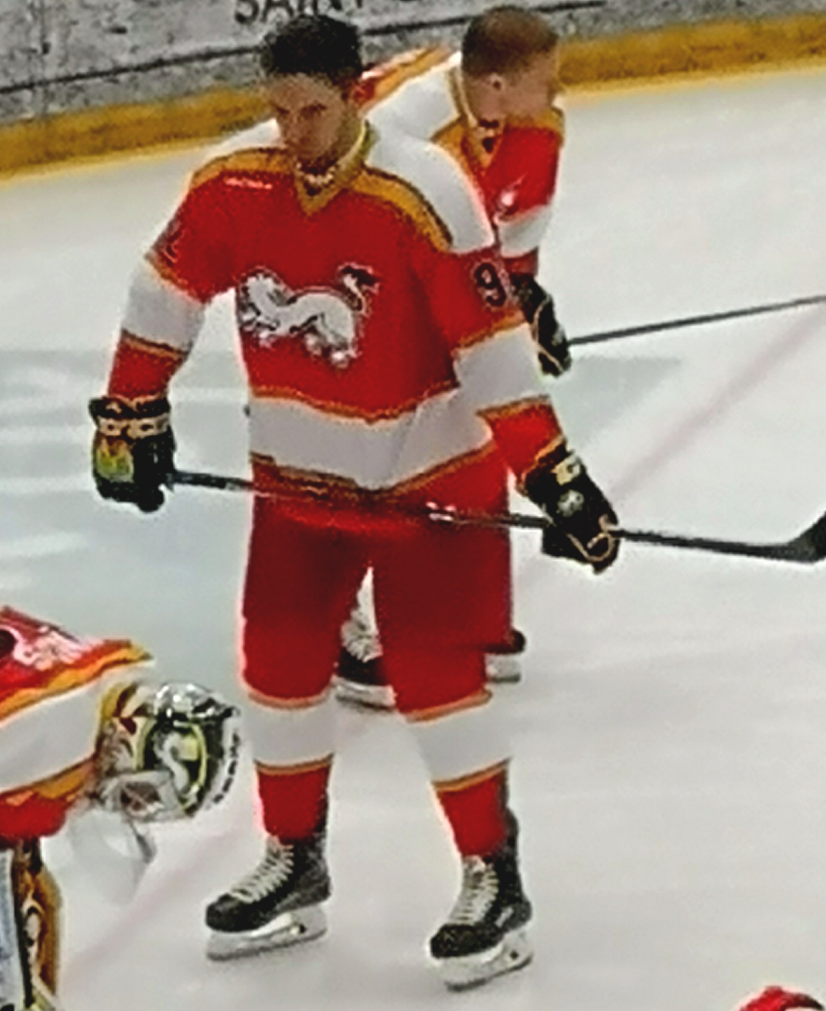 Oskar Osala retropaidassa Kärpät-Ässät ottelussa 19.1.2018